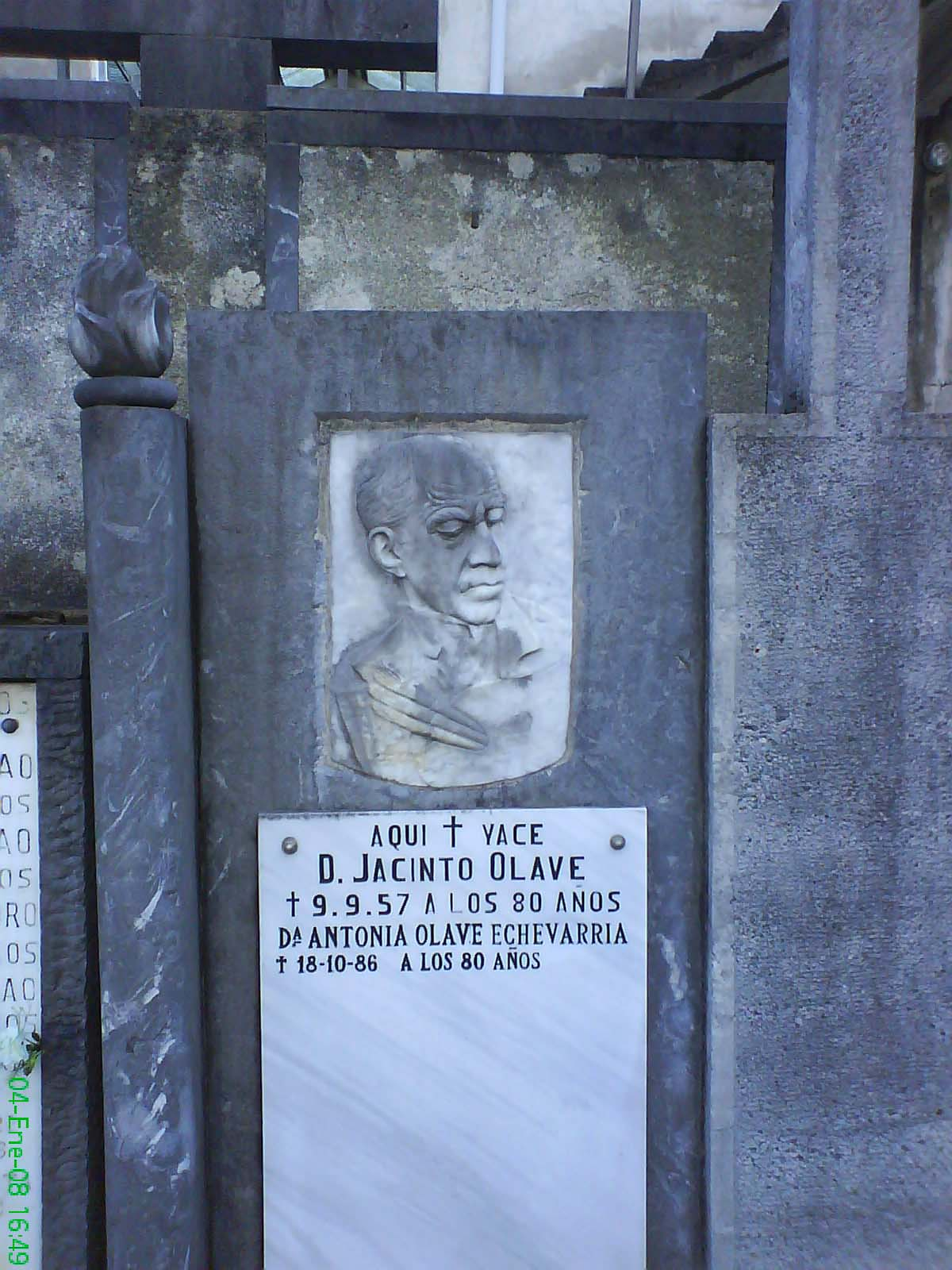 Tumba de Jacinto Olave en Eibar (Guipúzcoa, País Vasco (España))